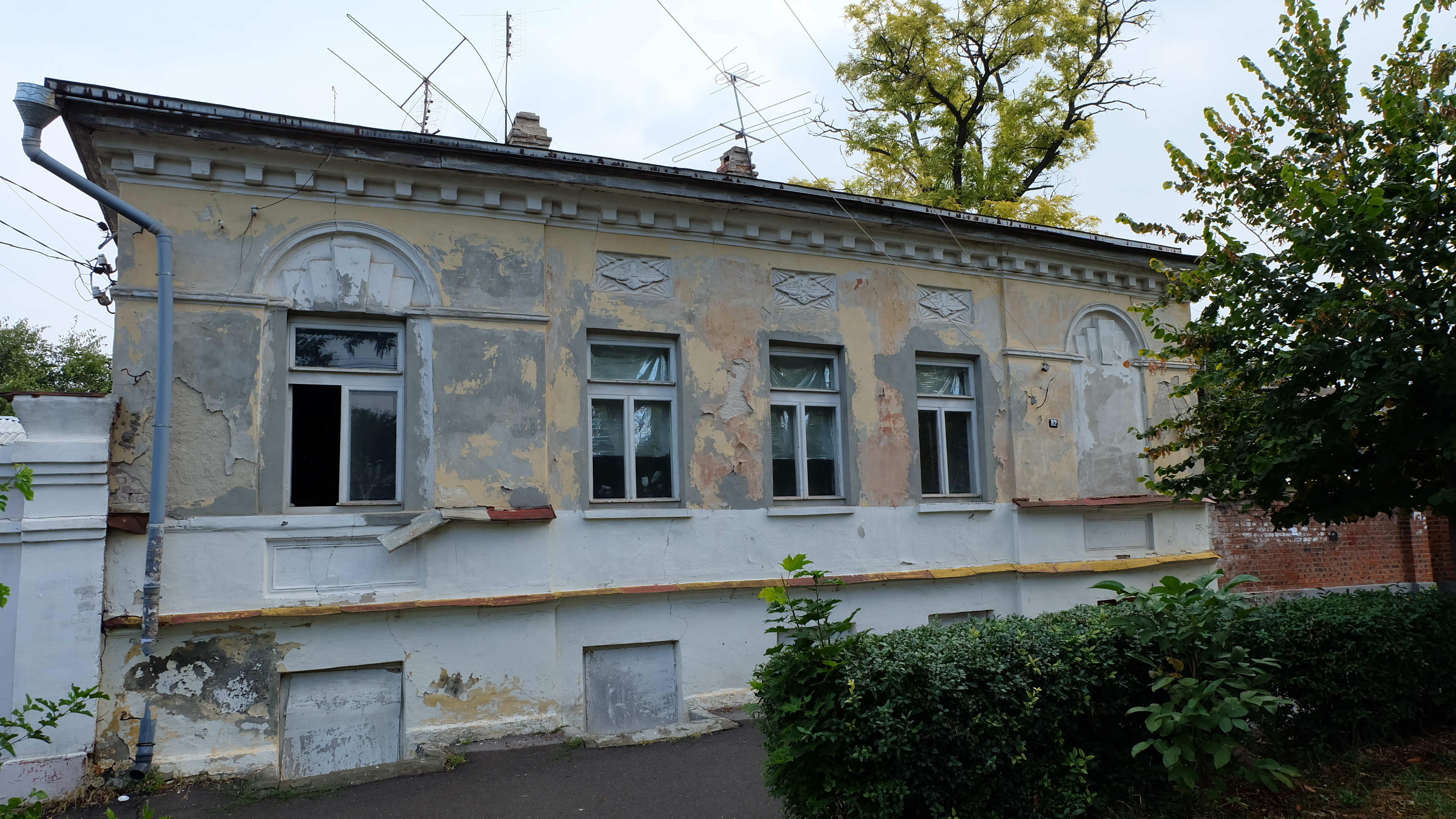 Жилой дом, комплекс застройки улицы: улица Чехова, 82, Таганрог, Ростовская область